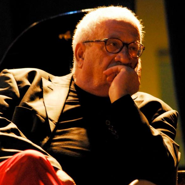 Mario di Iorio